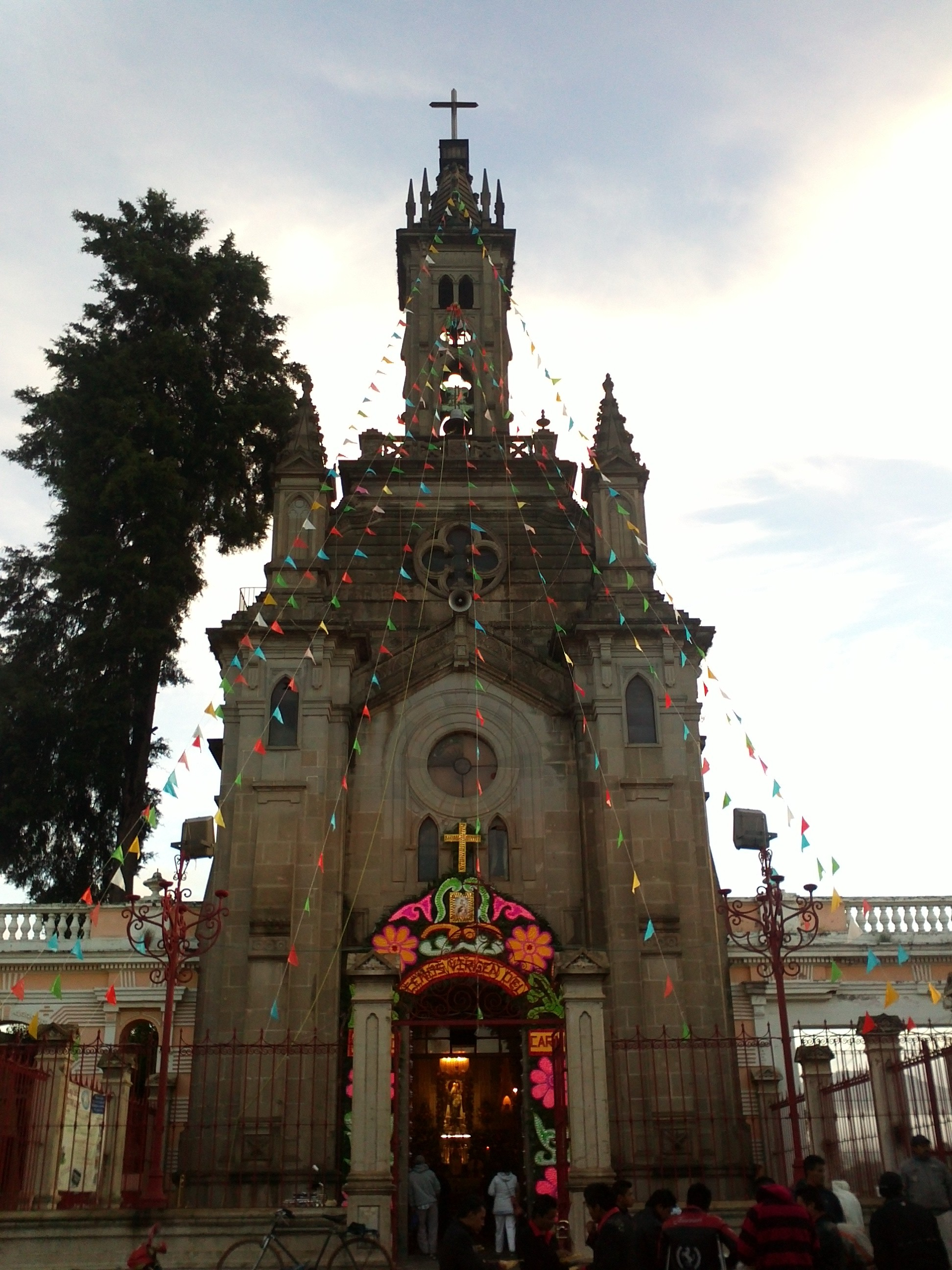 Iglesia del Carmen. San Martín Texmelucan